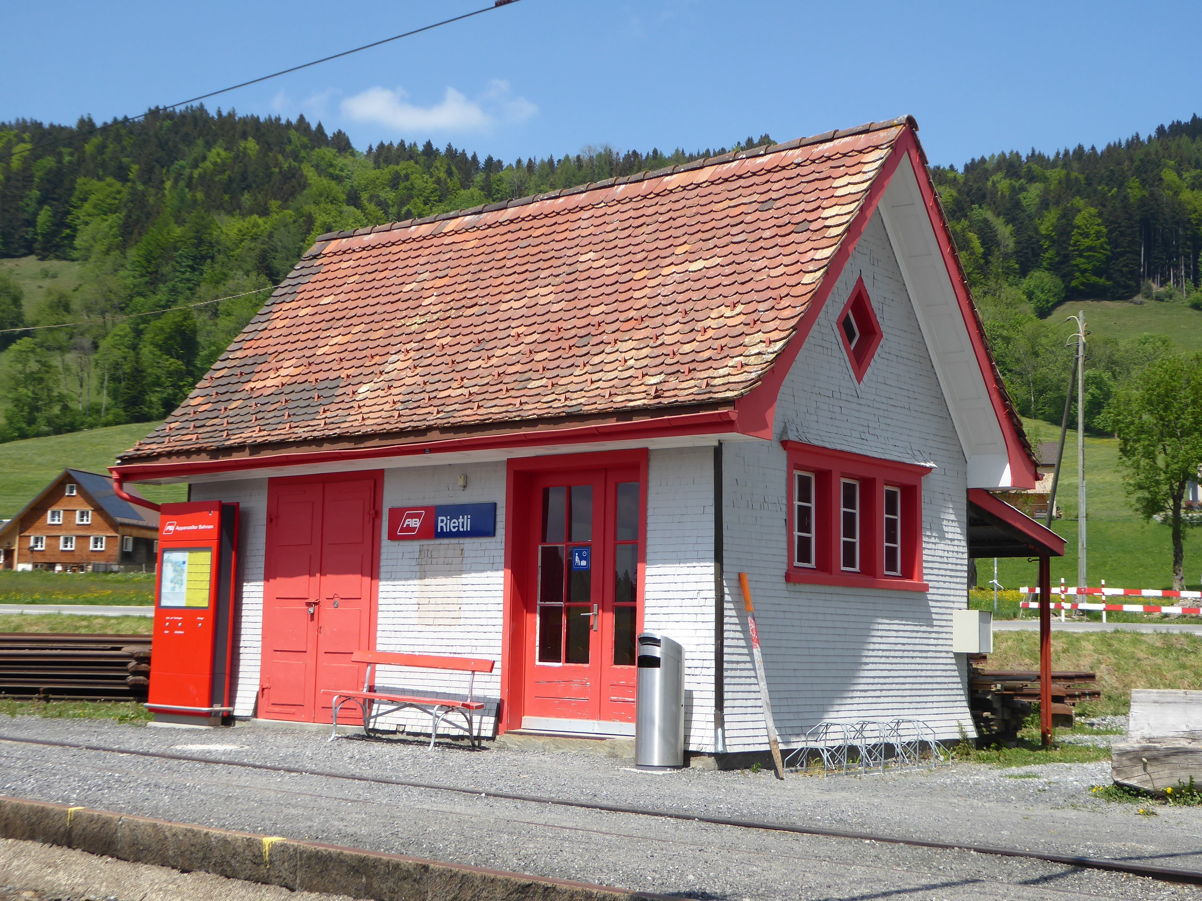 Schmuckes Wartehäuschen der Haltestelle Rietli an der Bahnstrecke Altstätten–Gais der Appenzeller Bahnen